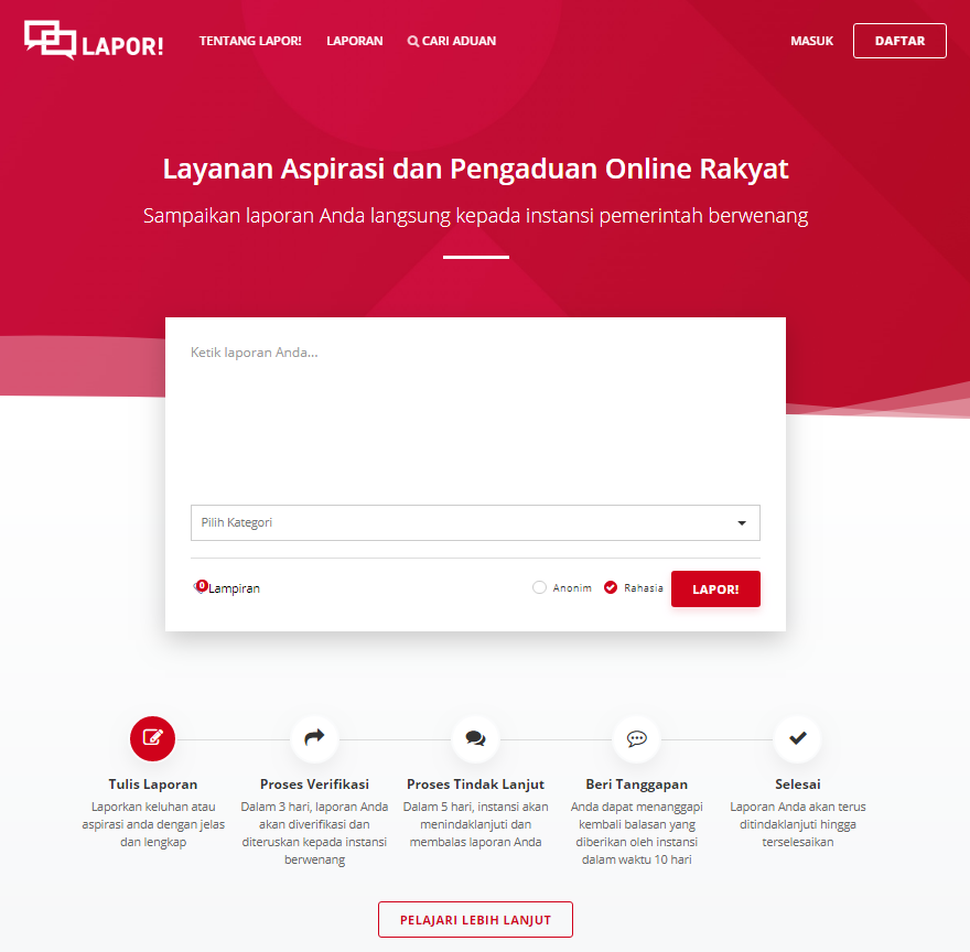 Layanan Aspirasi dan Pengaduan Online Rakyat